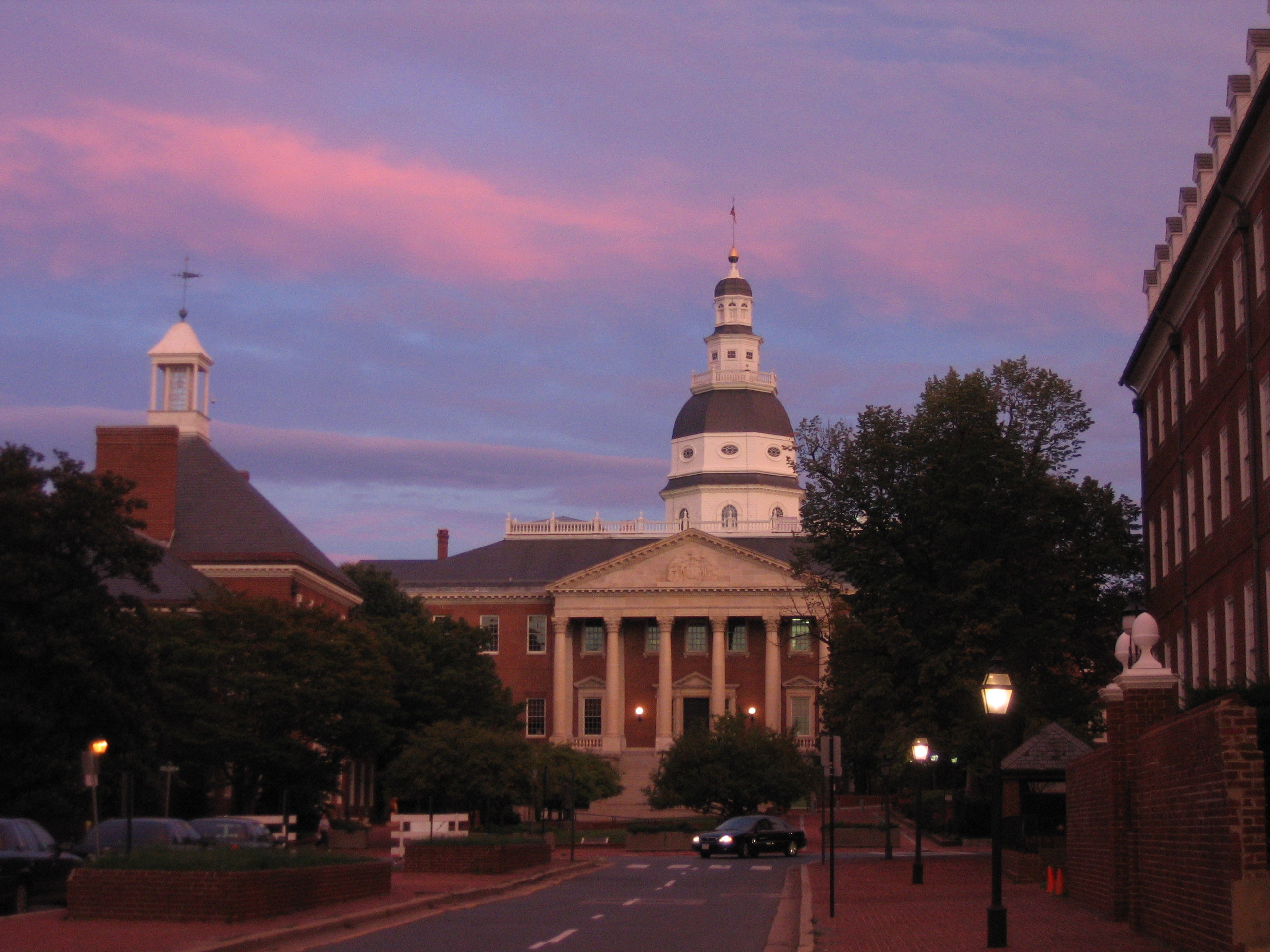 Annapolis, MD, USA